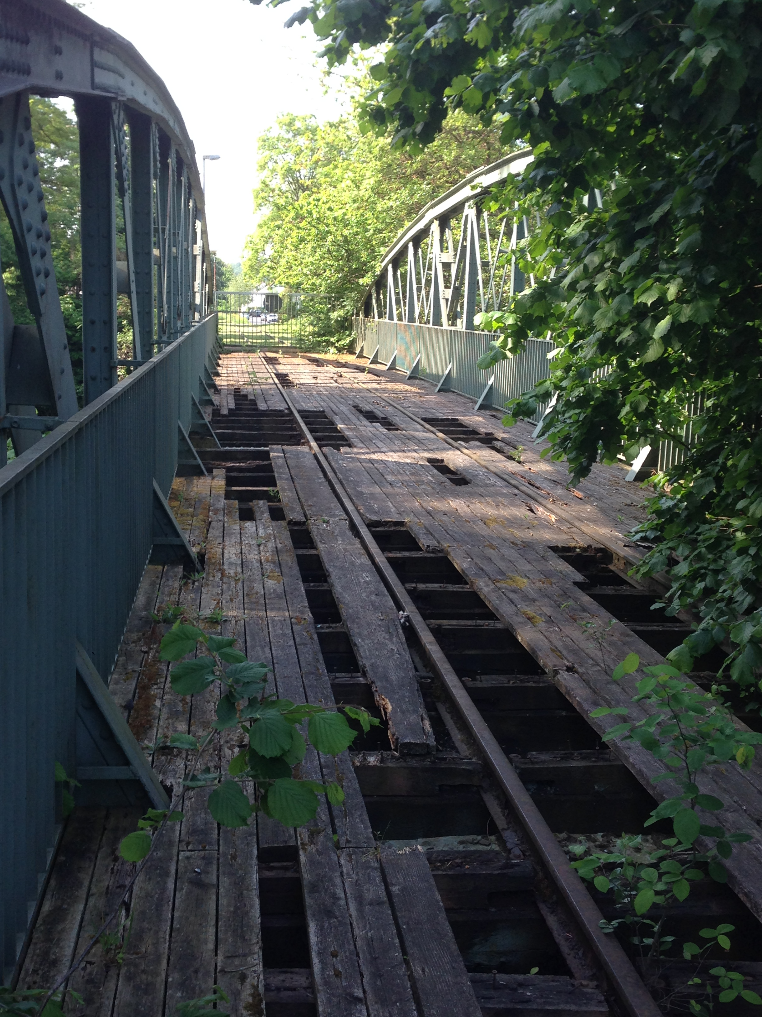 Wiedbrücke kurz vor dem Endpunkt der ehemaligen Bahn Neuwied–Rasselstein–Augustenthal